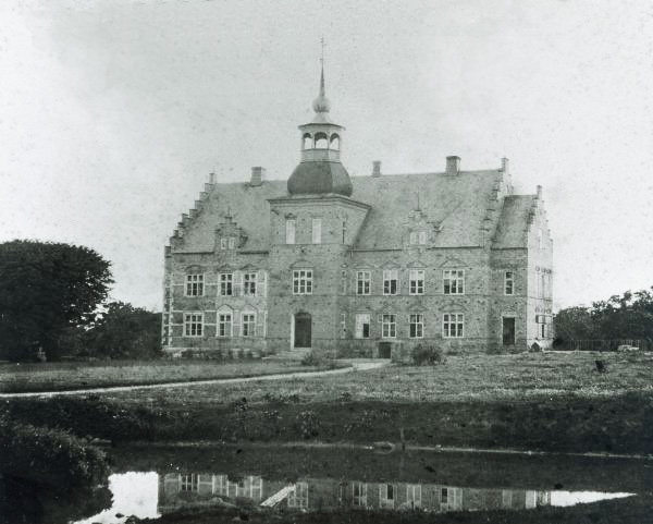 Pålsjö slott med kupol på tornet (slutet av 1800-talet).